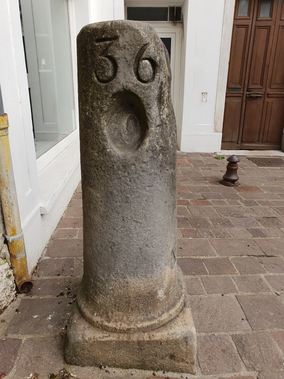 Borne d'Ancien Régime de Moret-sur-Loing. Elle indique les 36 demi-lieues qui séparent Moret de Paris, soit environ 70 kilomètres. Elle était initialement gravée d'une fleur de lys qui a été martelée à la Révolution.